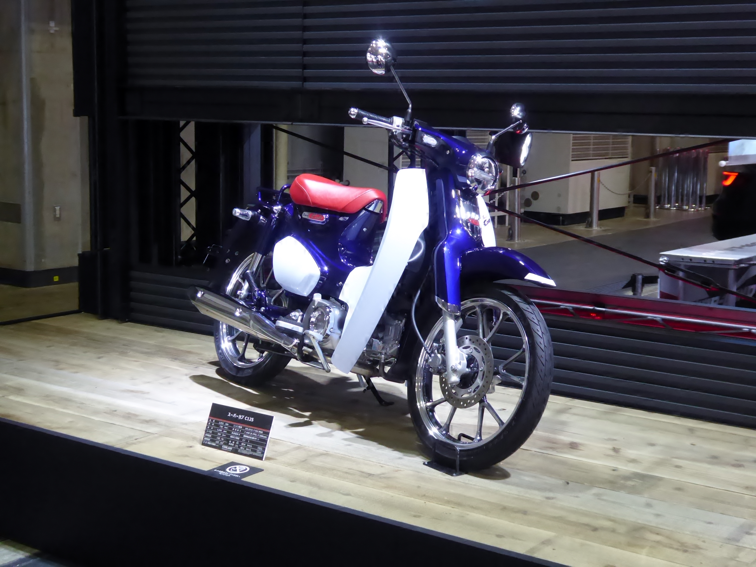 大阪オートメッセ2019に於いて2BJ-JA48型ホンダ・スーパーカブC125を撮影。